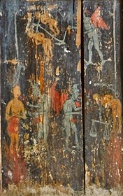 Детайл от иконостаса на църквата "Свети Георги" в Янешево, Кукушко